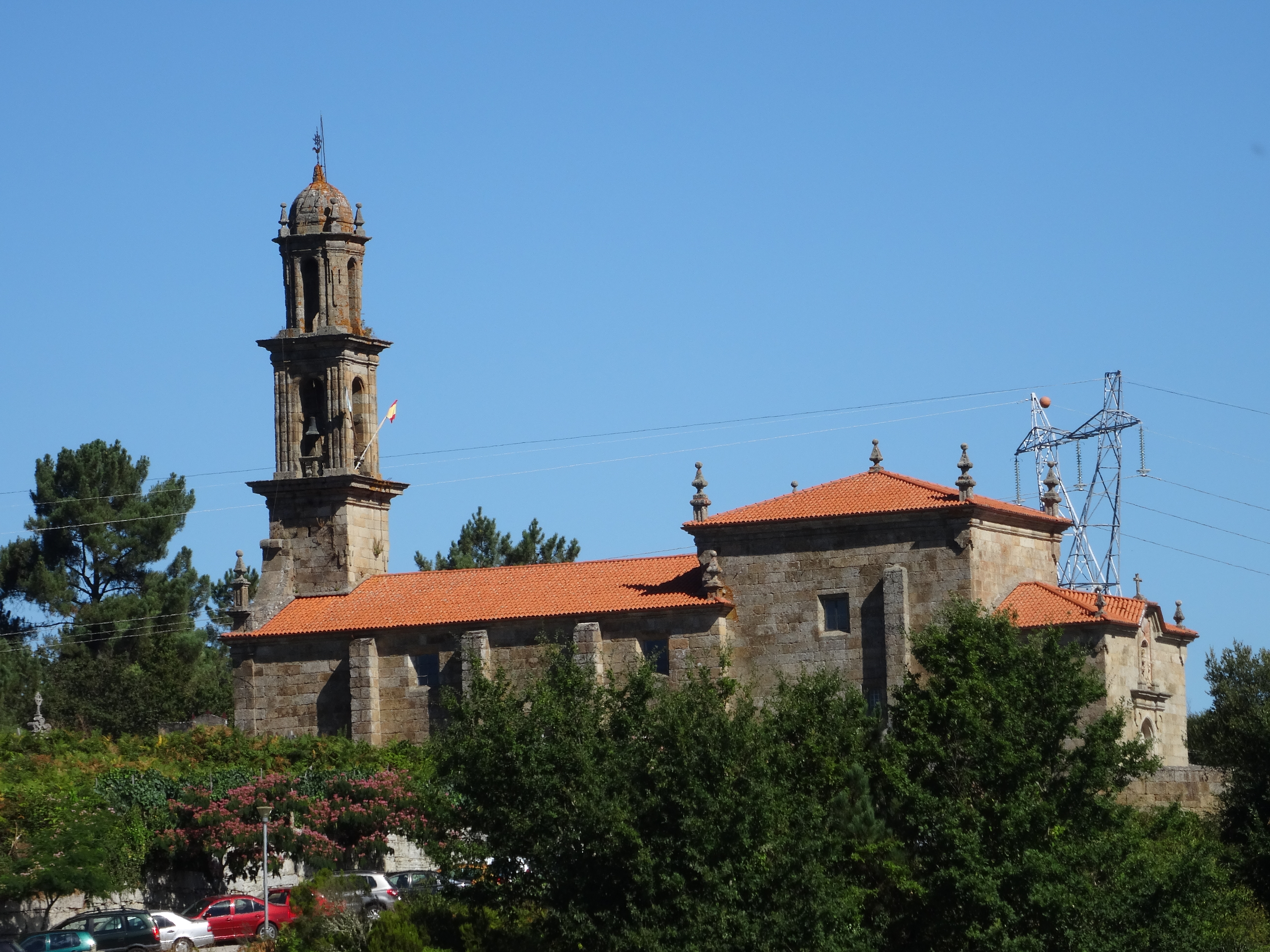 Ver título.